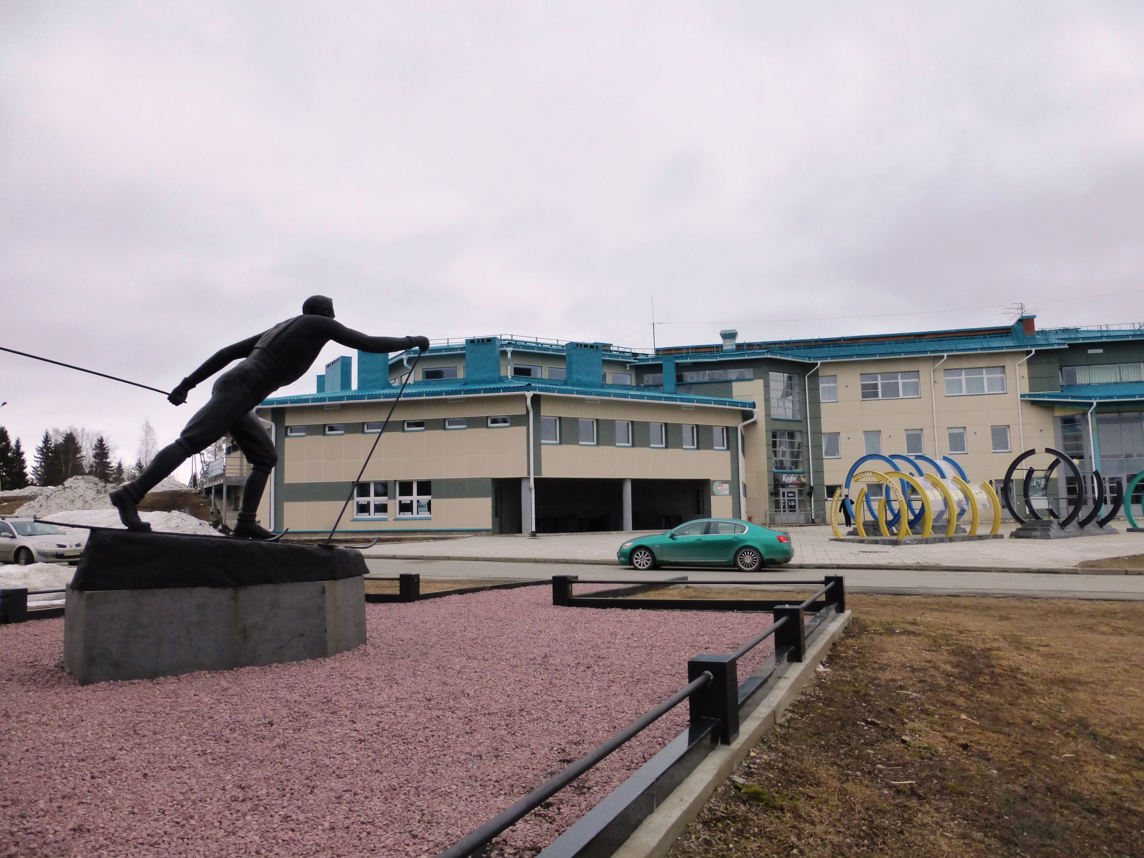 Республиканская спортивная школа олимпийского резерва в Петрозаводске (Курганский проезд, 3) на территории республиканского лыжного центра «Курган» имени олимпийского чемпиона Фёдора Терентьева.